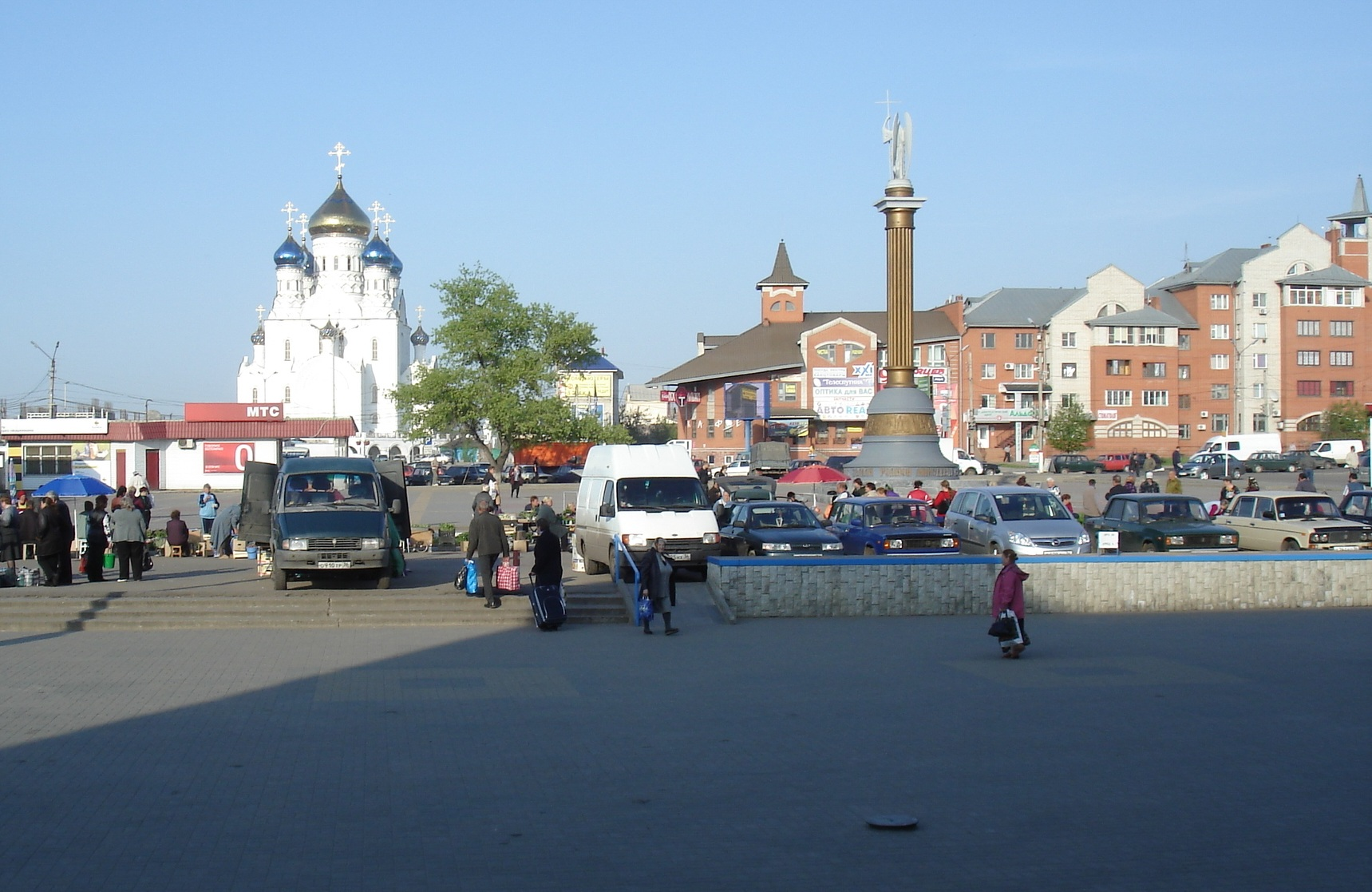 Город Лиски, вид на собор с площади ЖД-вокзала